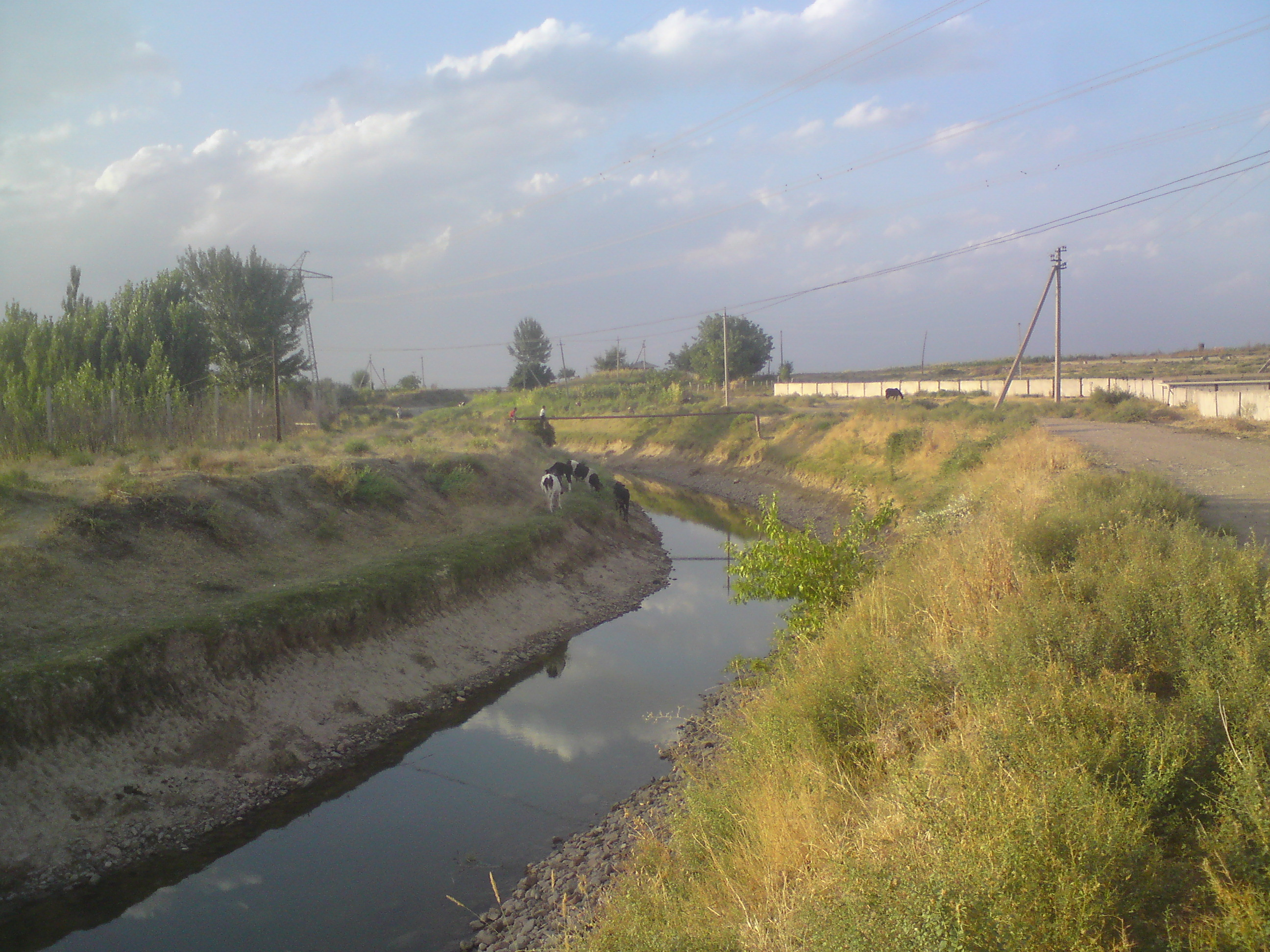 Паркентский магистральный канал у города Паркет, Ташкентский вилоят, Узбекистан